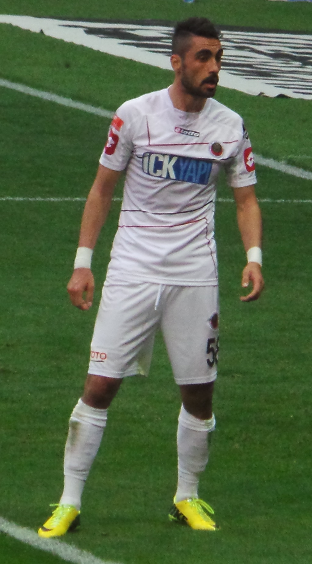 Uğur Çiftçi